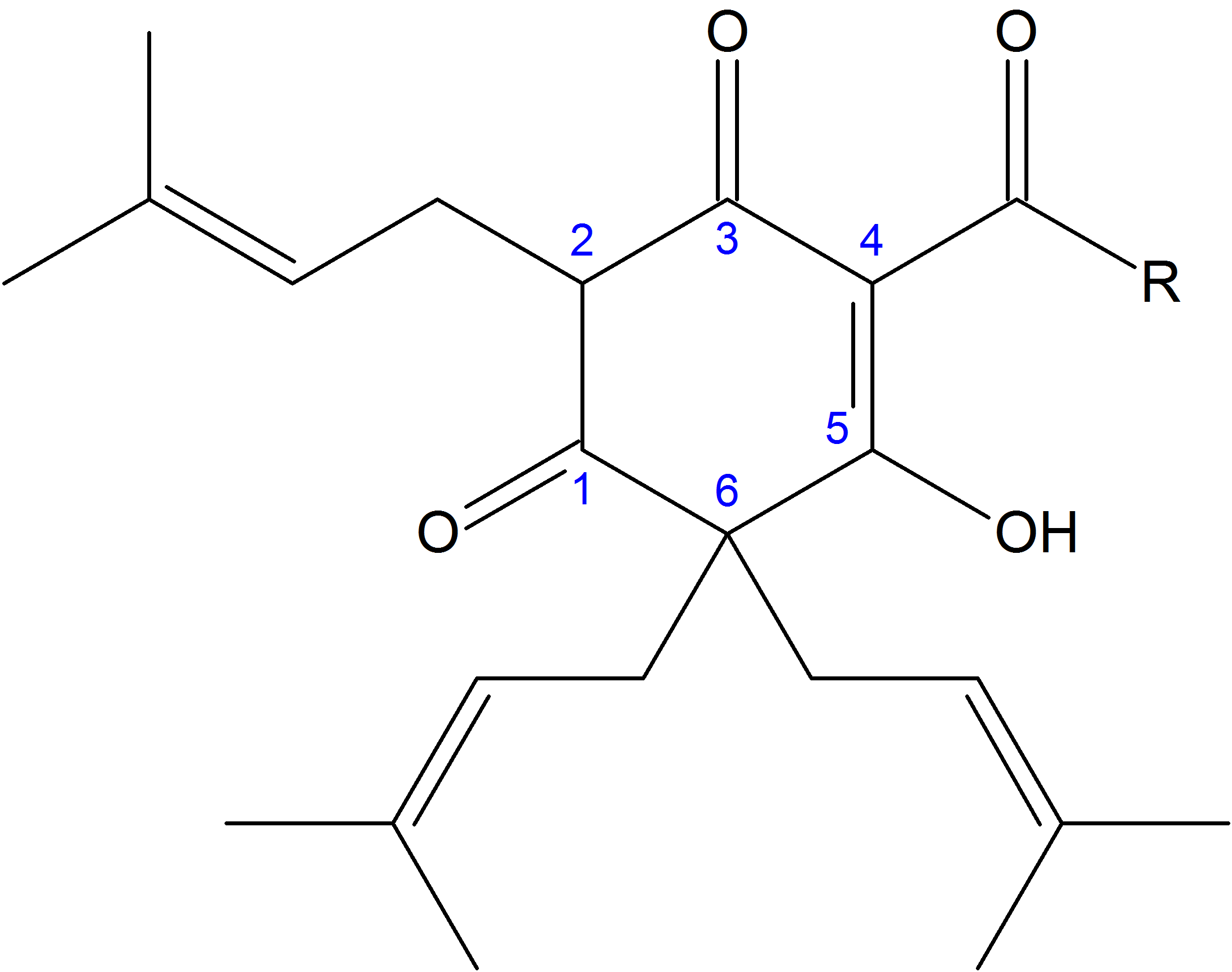 Allgemeine Strukturformel der Lupulone